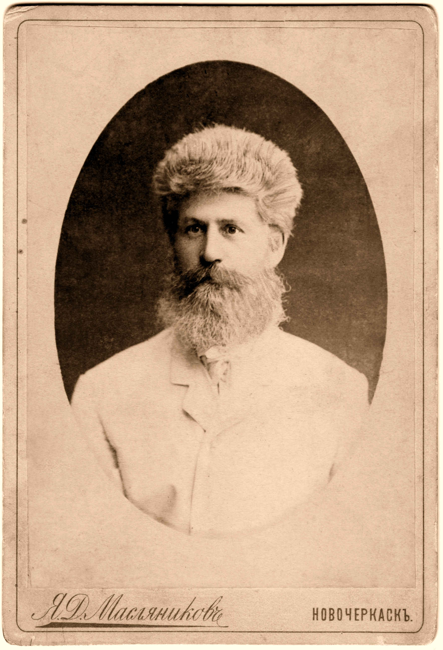 Ипполит Александрович Прощаков, 1890-е года